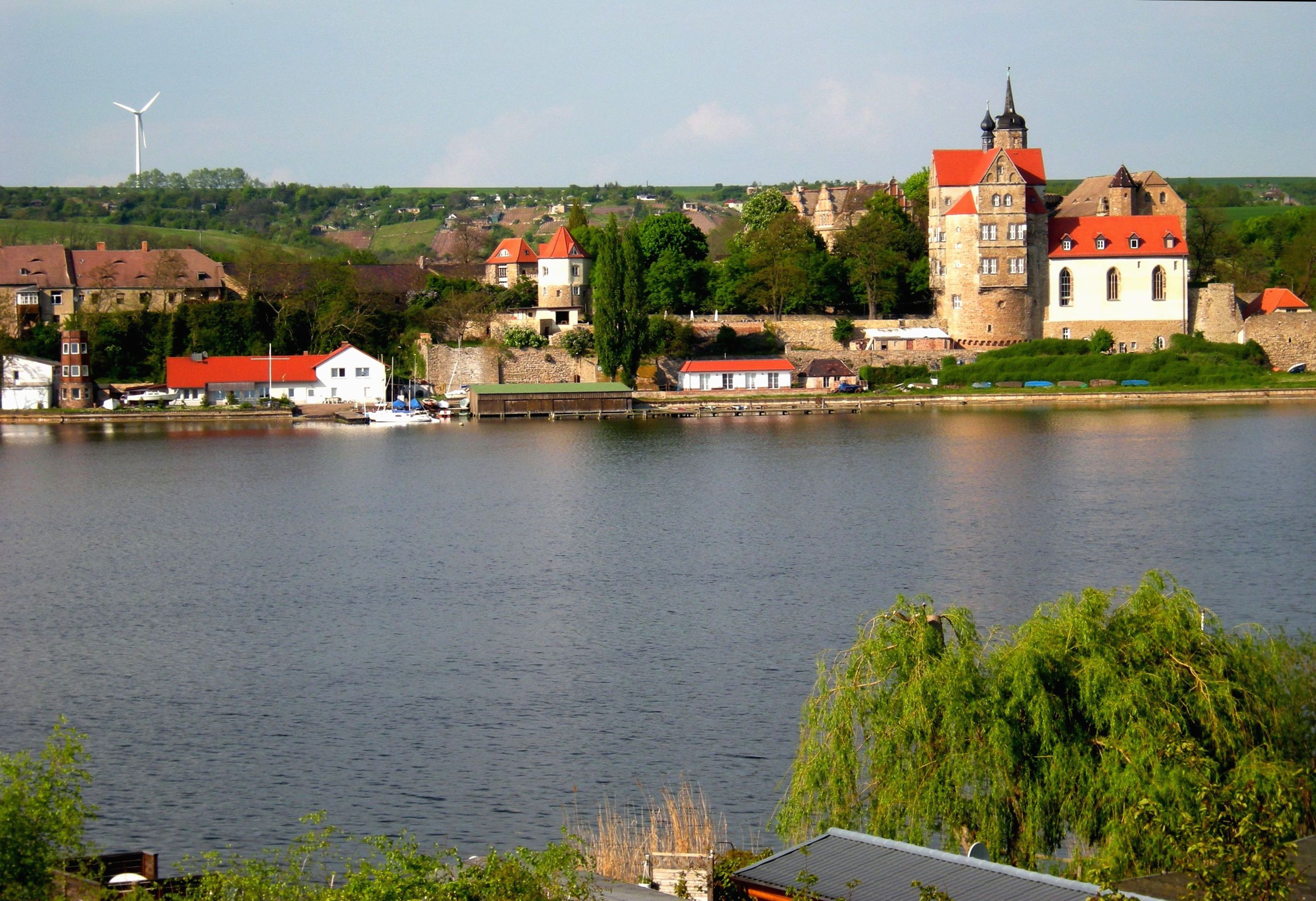 Seeburg am Süsser See - Schloss